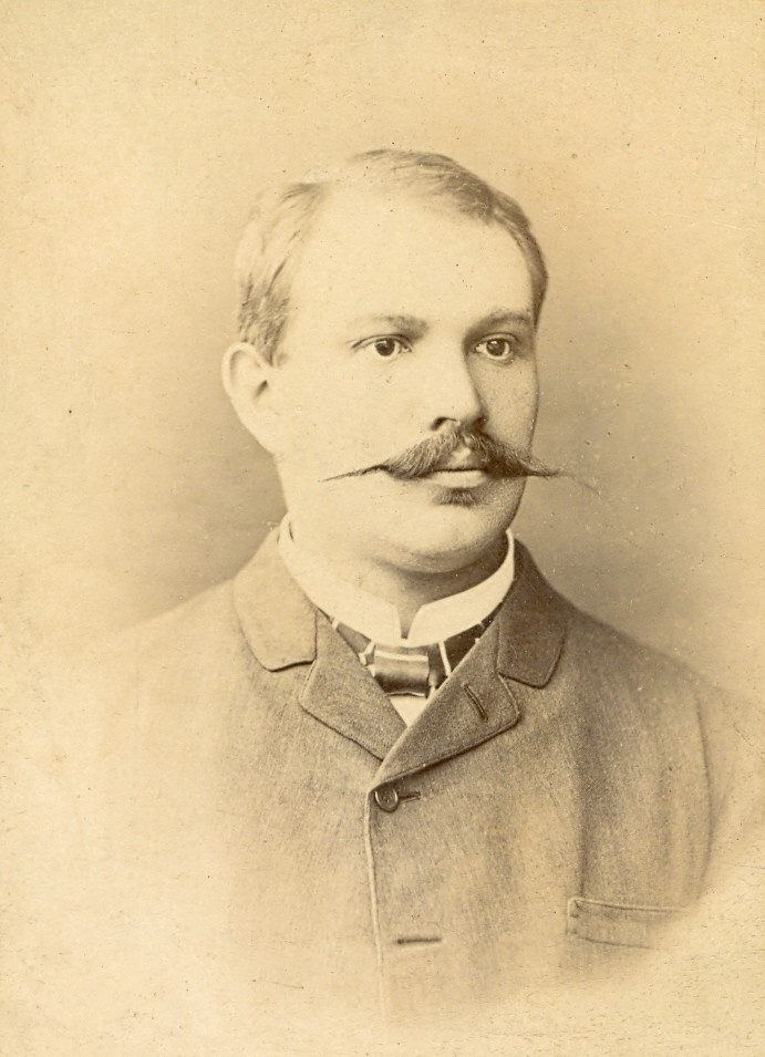 Vilém Holoubek (1859 - 1924), Český a rakouský politik.